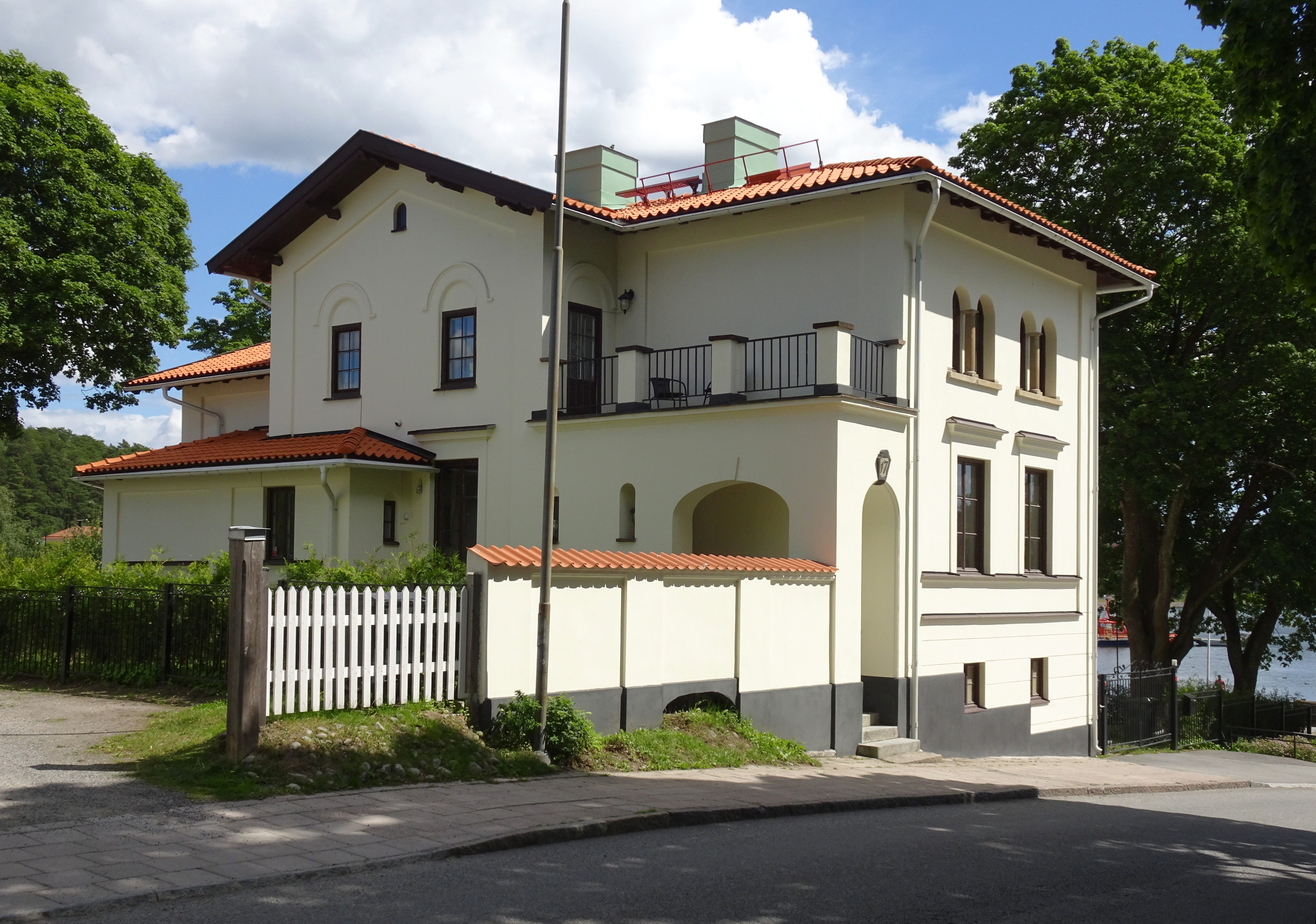 Vattumannen 2, Södertälje. Borgmästarvillan (även kallat Huset Ingenting), arkitekt Tore E:son Lindhberg